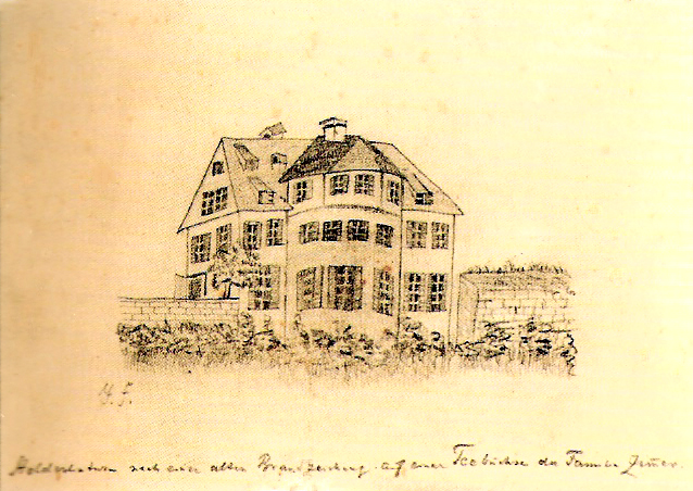 „Ansicht des Zimmerschen Hauses mit dem Hölderlinturm“ (Zeichnung 11,8 × 16,2 cm)